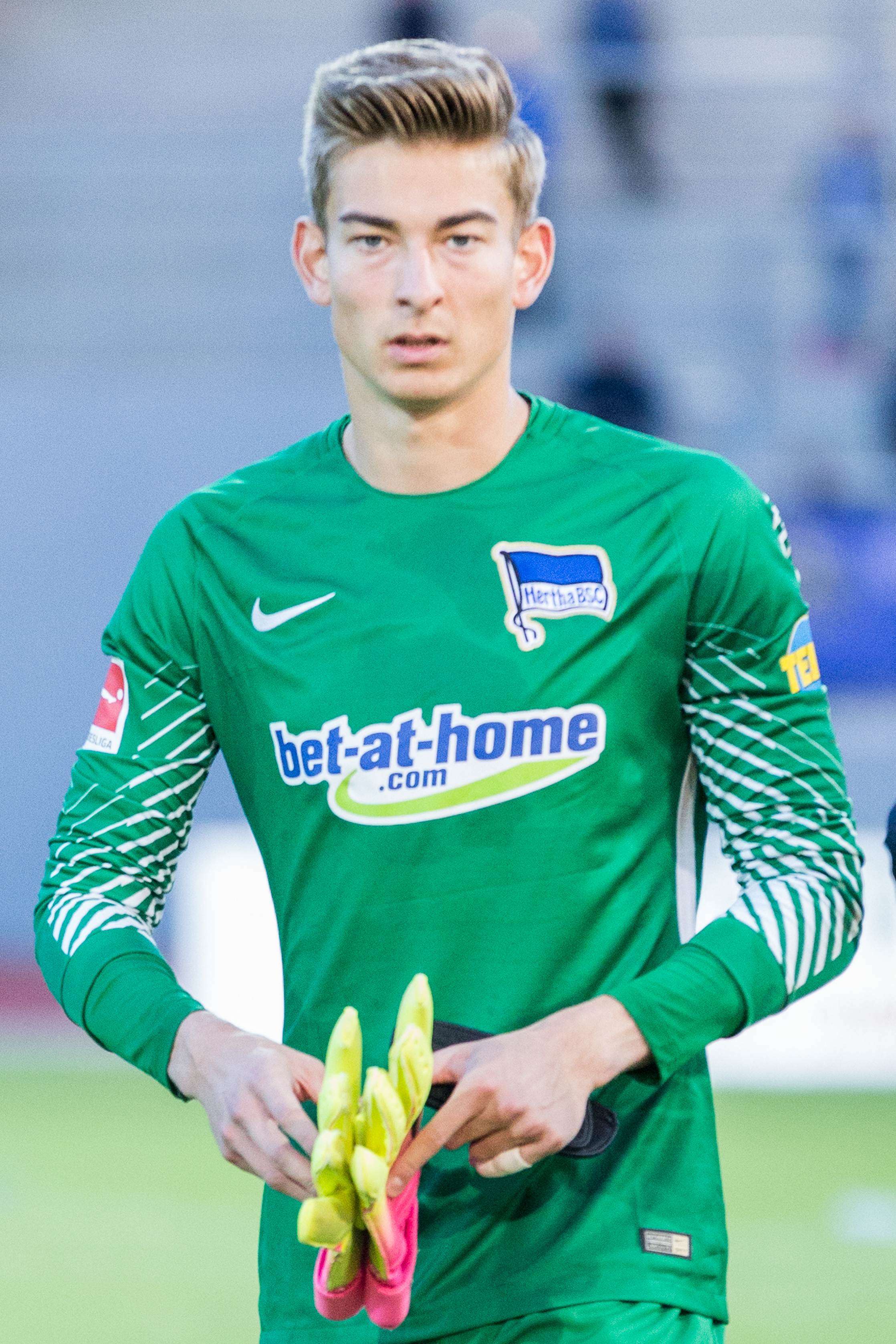 Jonathan Klinsmann